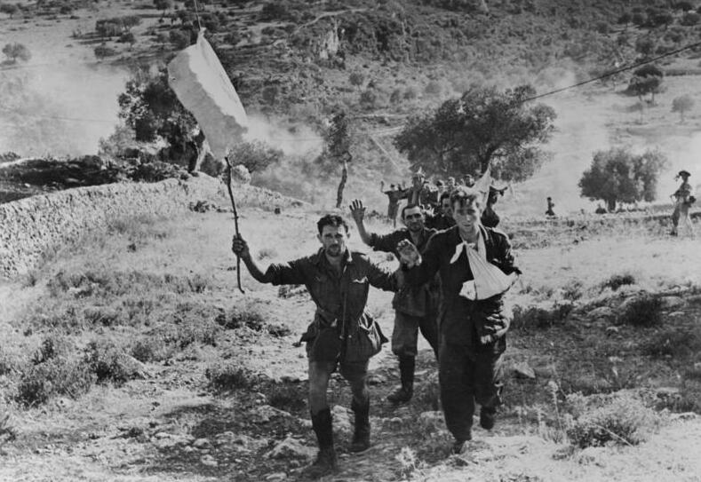 Sizilien 1943 Italienische Truppen laufen zu den Briten über. Information added by Wikimedia users.*